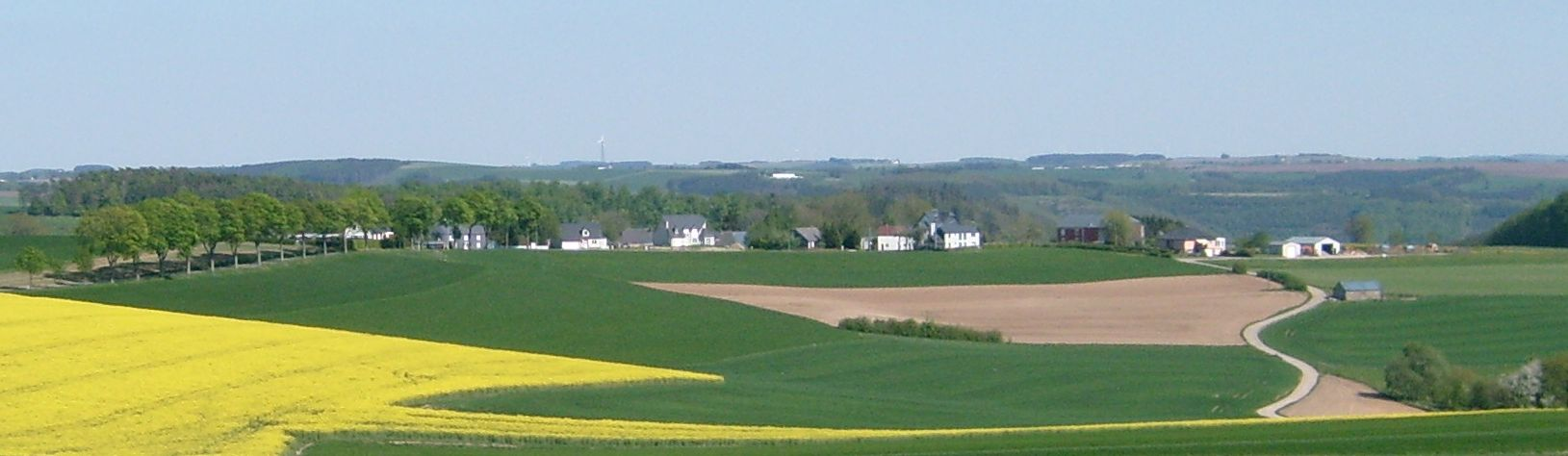 Vue vu Beeler op Leetem.